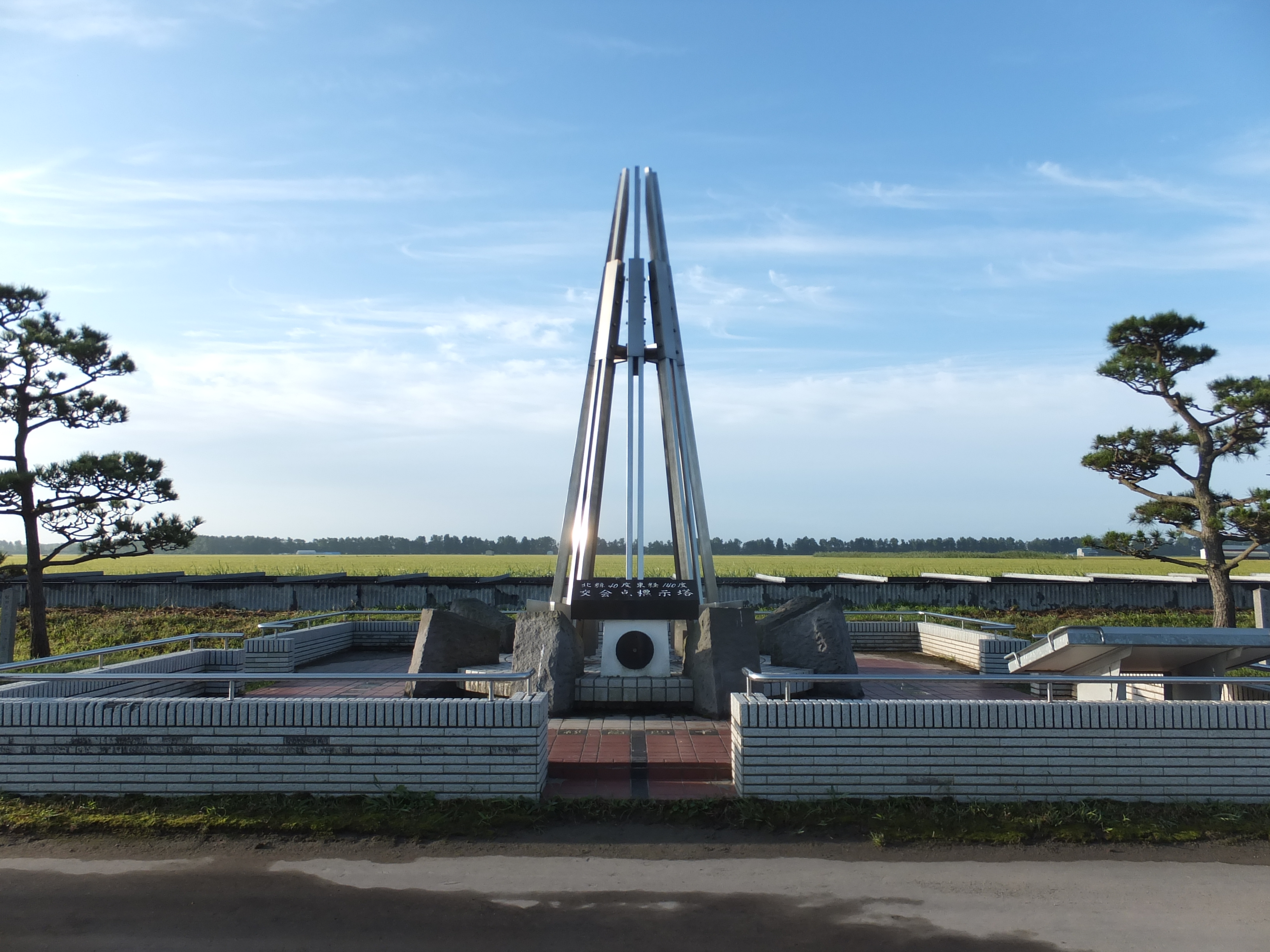 北緯40度・東経140度 経緯度交会点（秋田県大潟村）。日本で唯一、10度単位で経緯度が交わる陸地である。モニュメントが設置されているが、ここまでの道のりは舗装されていない。